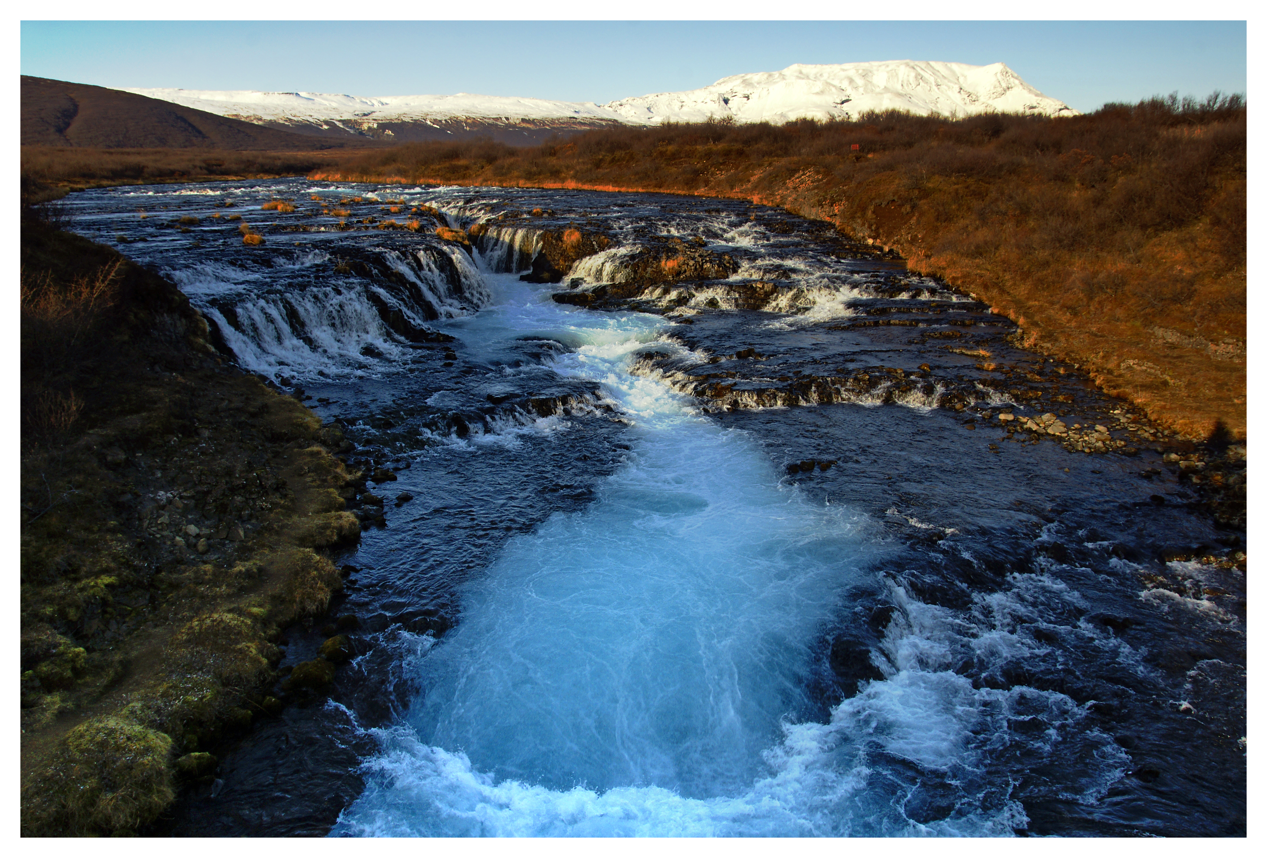 Brúarfoss